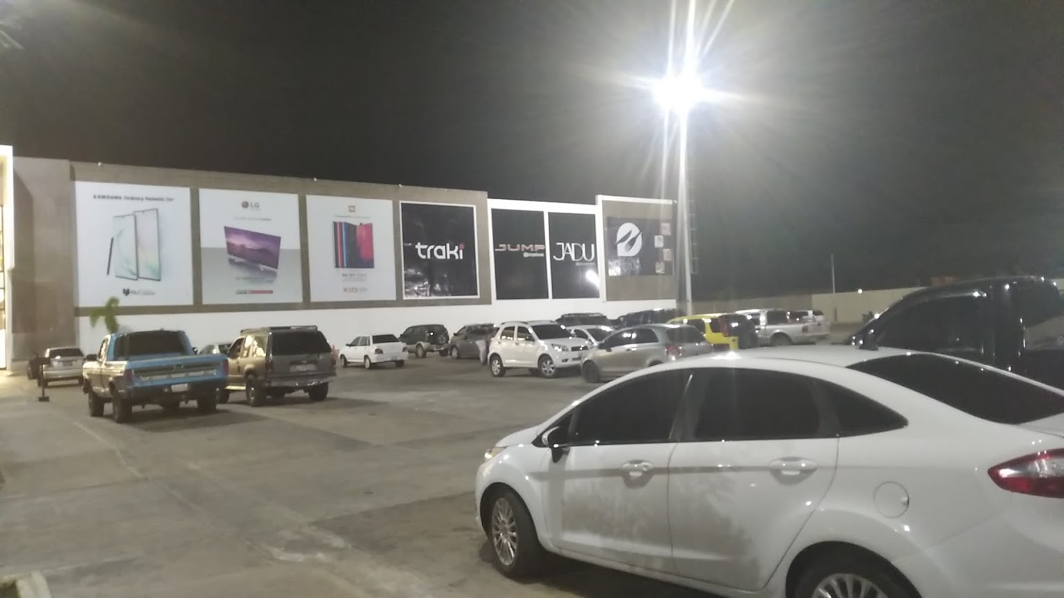 HIPERCALERIAS VALLE DE LA PASCUA.